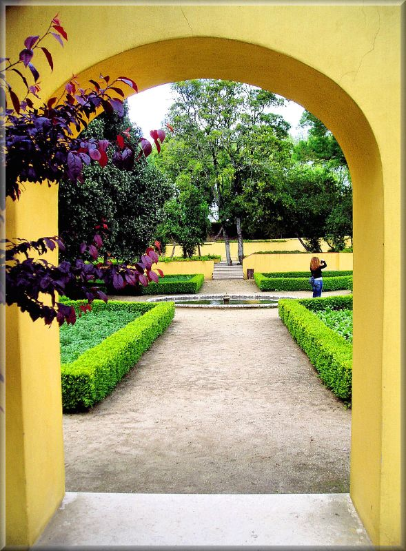 Portugal Mafra Jardim do Cerco